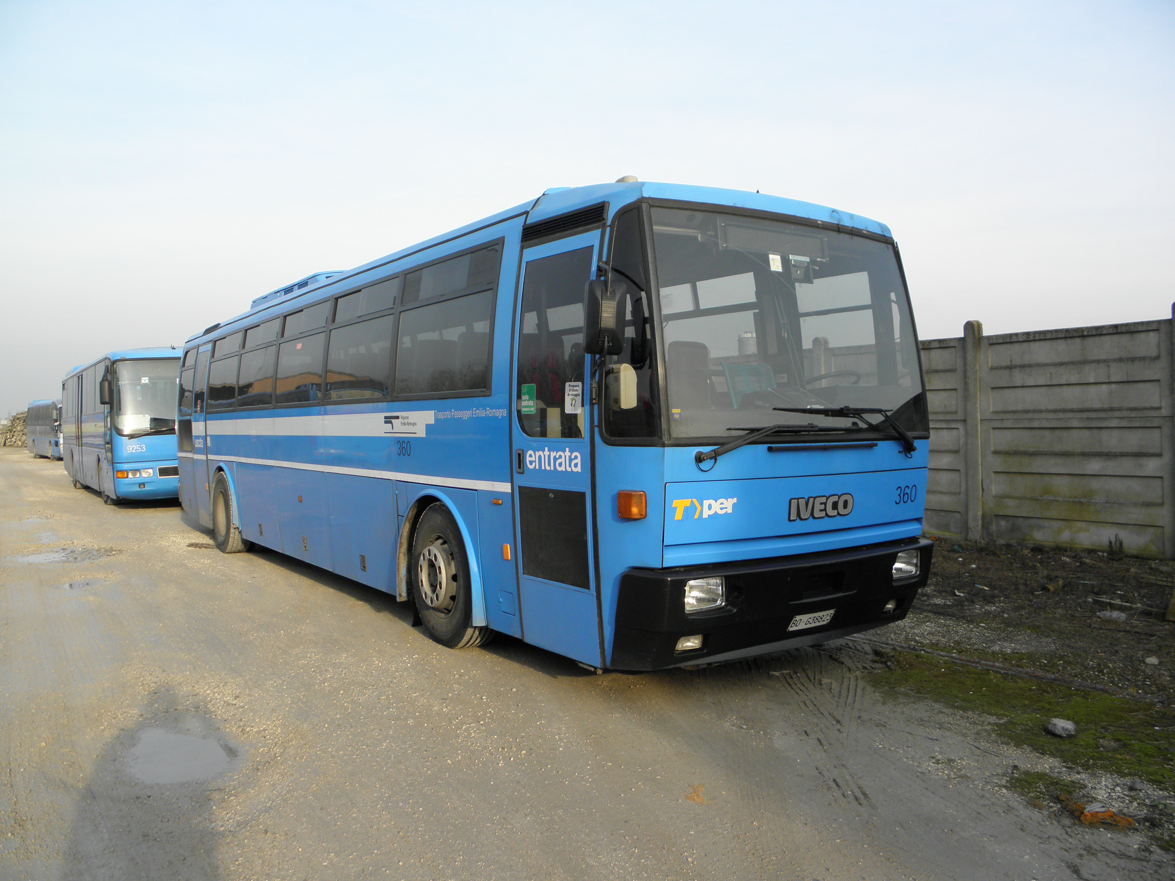 Stazione di Codigoro, parcheggio mezzi Stazione di Copparo Trasporto Passeggeri Emilia-Romagna (TPER).